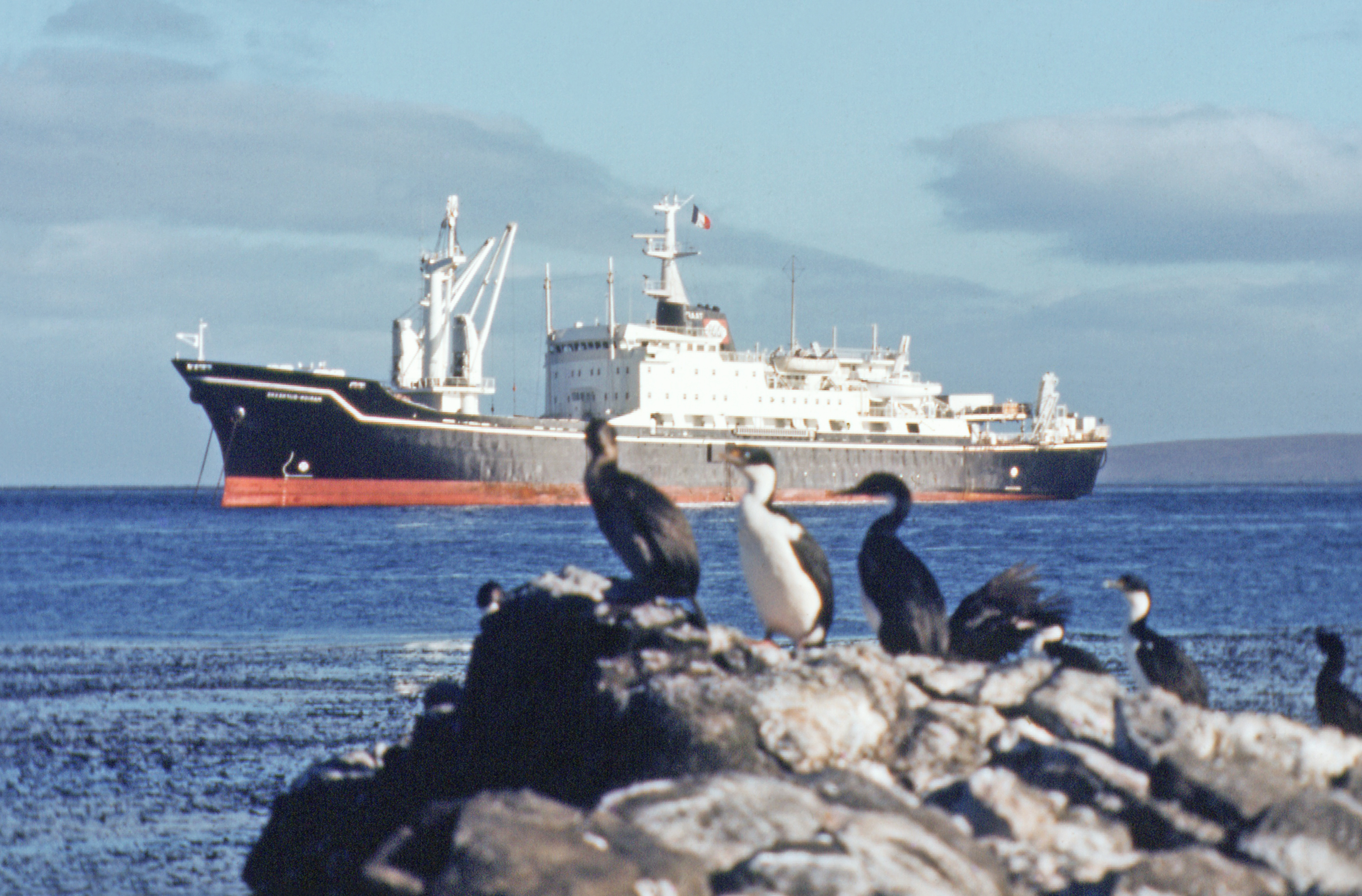 le Marion Dufresne (premier du nom), au mouillage de vant la base de Port-Aux-Français, archipel des Kerguelen (Terres Australes et Antarctiques Françaises)